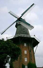 Stiftsmühle in Aurich Ostfriesland, Foto: Jürgen Wieckmann